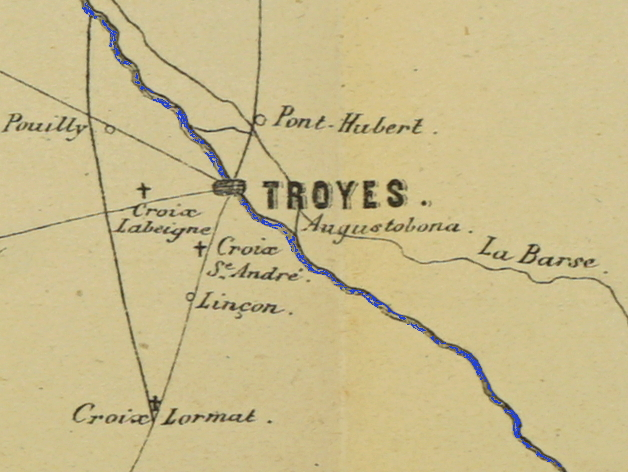 par Corrard de Bréban